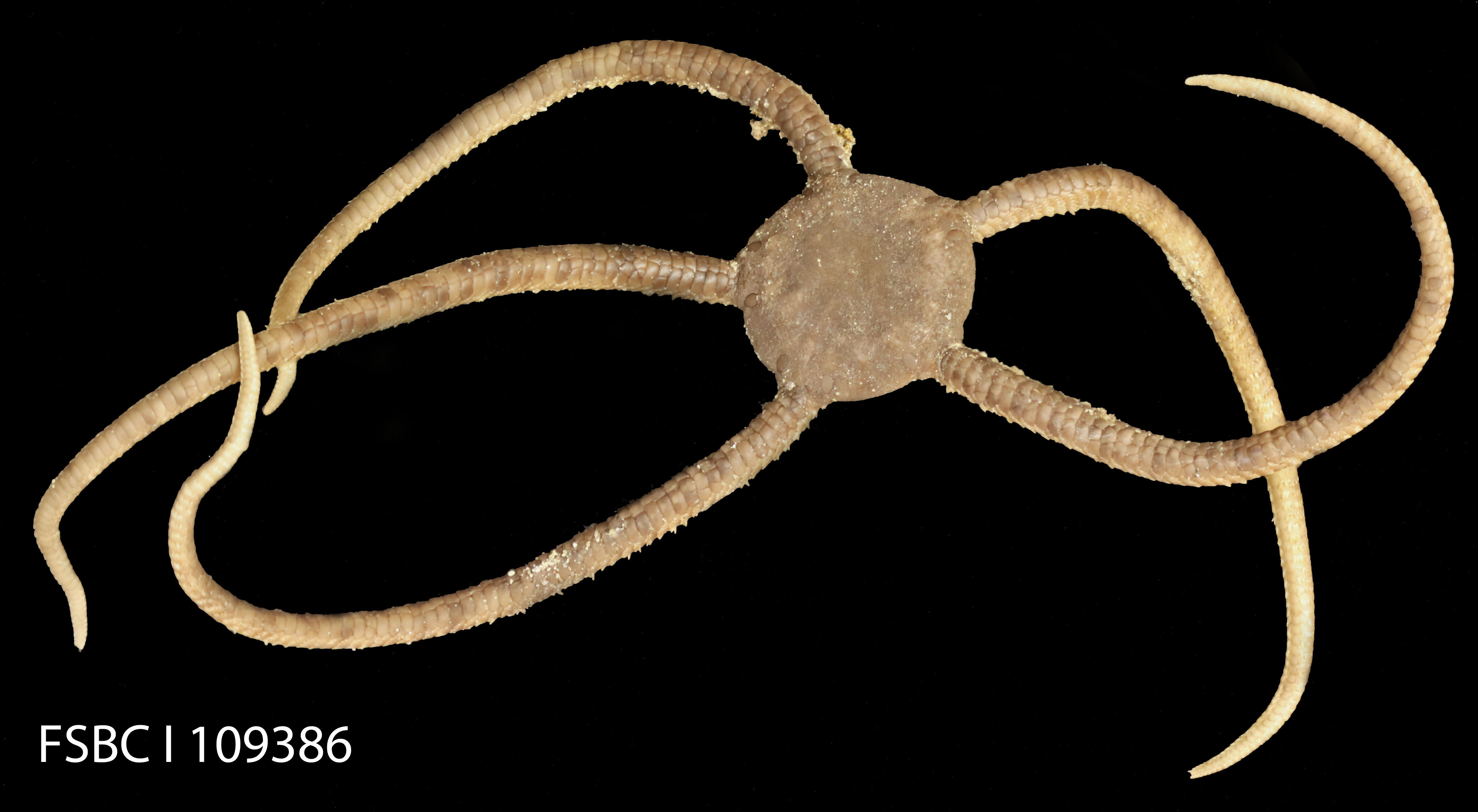 Scientific name: Ophioderma cinerea '